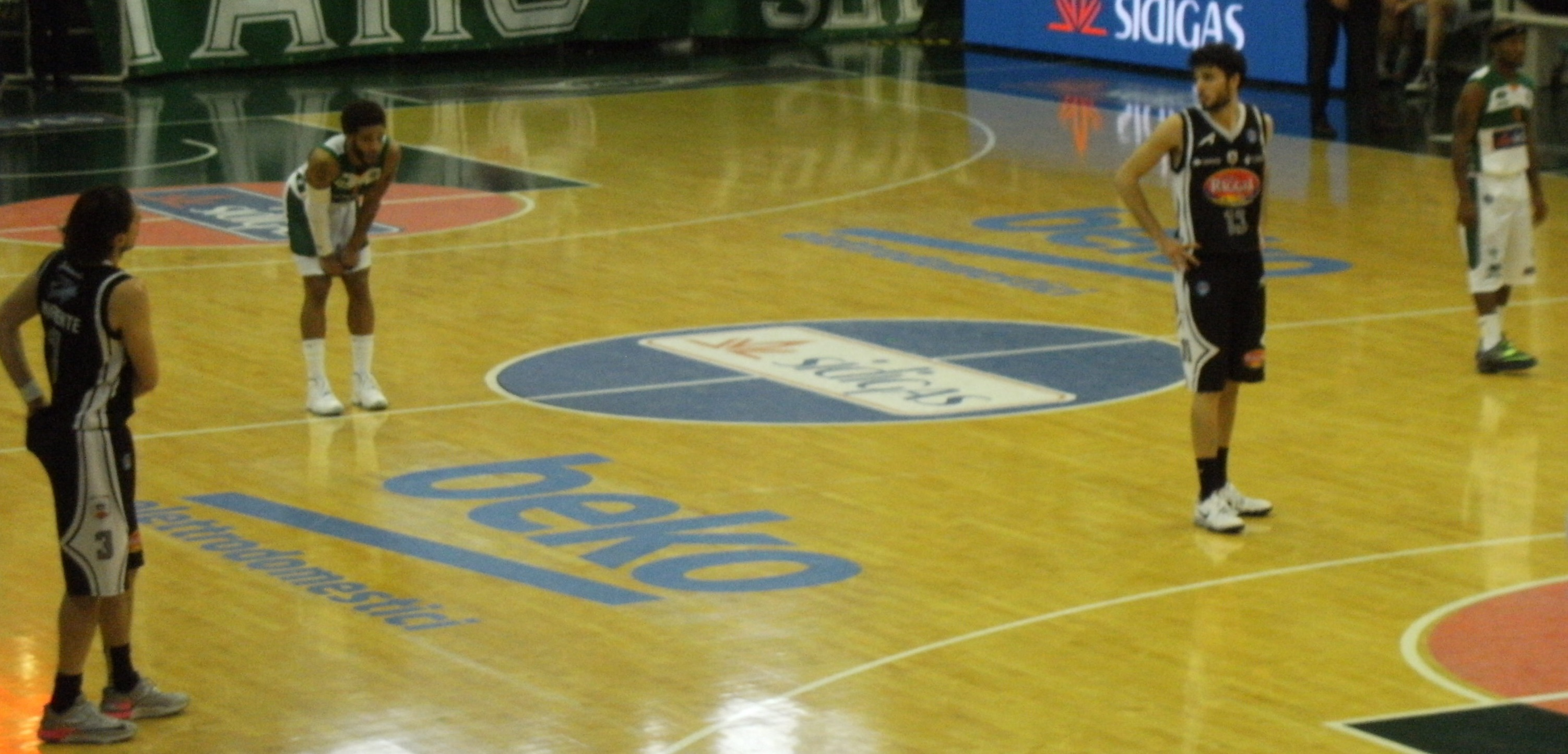 Società Sportiva Felice Scandone - Juvecaserta Basket 70-74 19/04/2015 Palasport Giacomo Del Mauro di Avellino